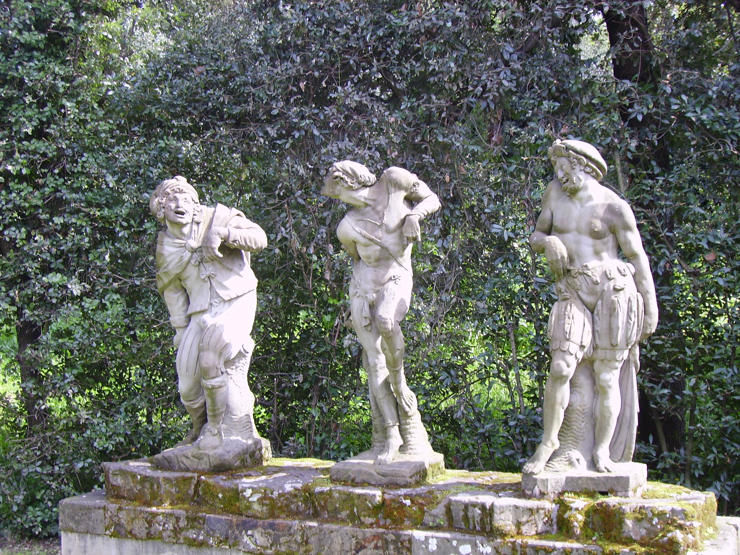 Three grotesque figuers by Romolo Ferrucci del Tadda (1617-21)